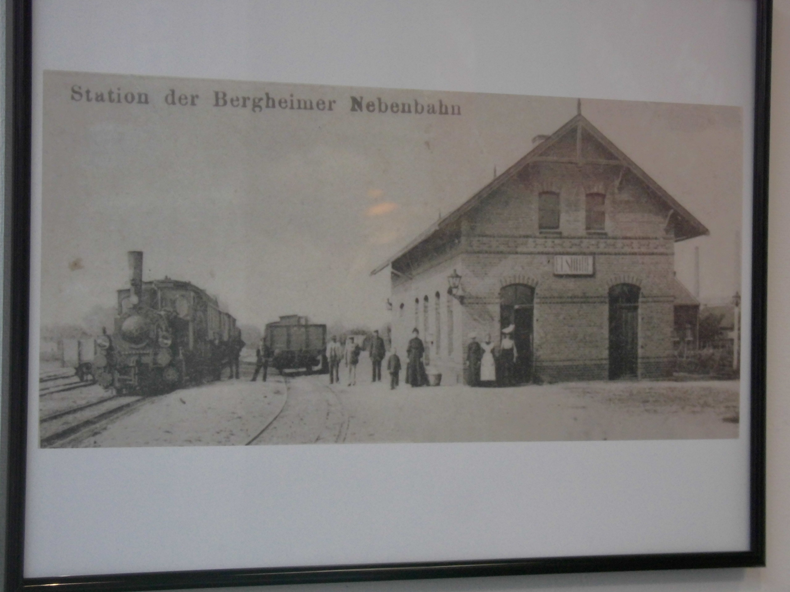 Zustand nach dem Ausbau auf dreischieniges Gleis